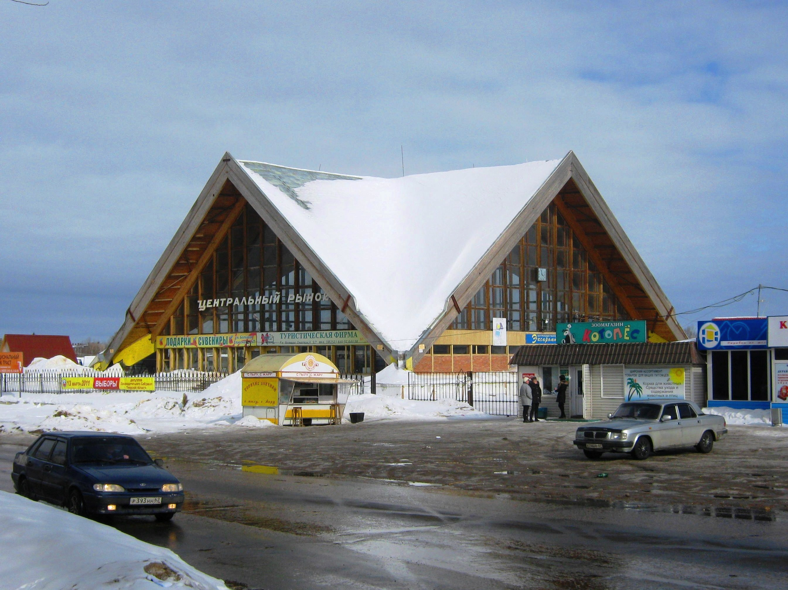 Центральный рынок (Ржев)